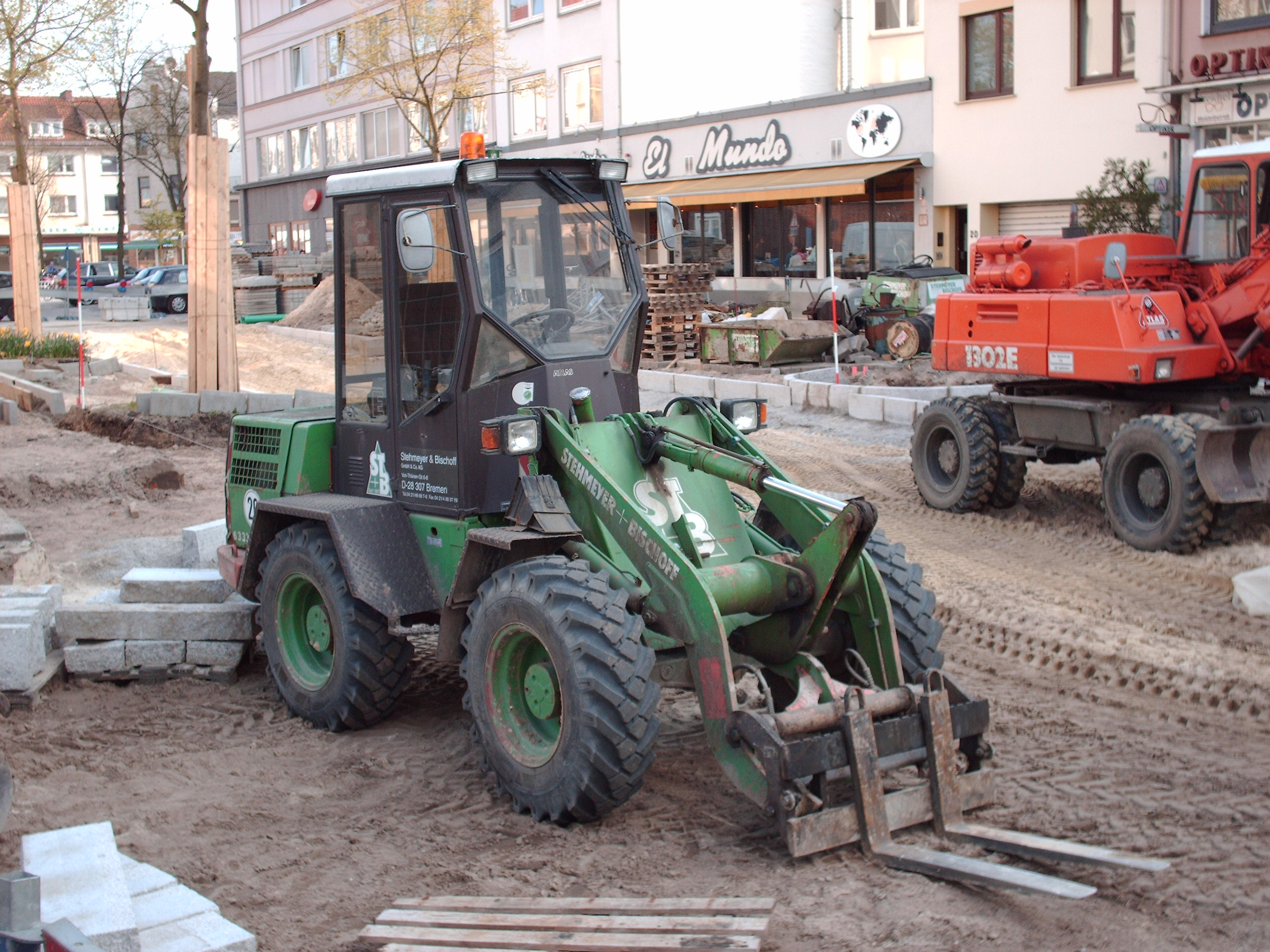 En knækstyret Atlas minilæsser med pallegaffel